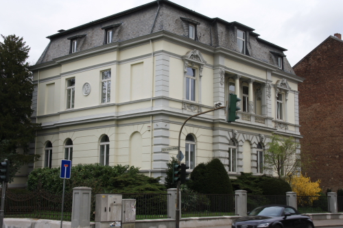 Haus der Industrie, Tivolistr. 76, Düren